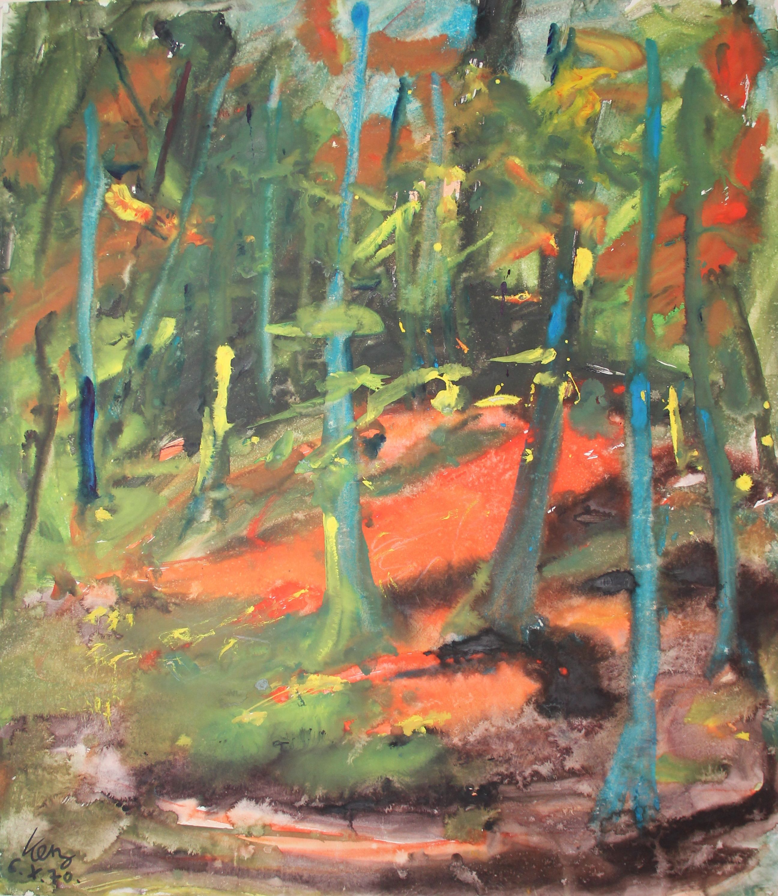 Wald 6.10.1970